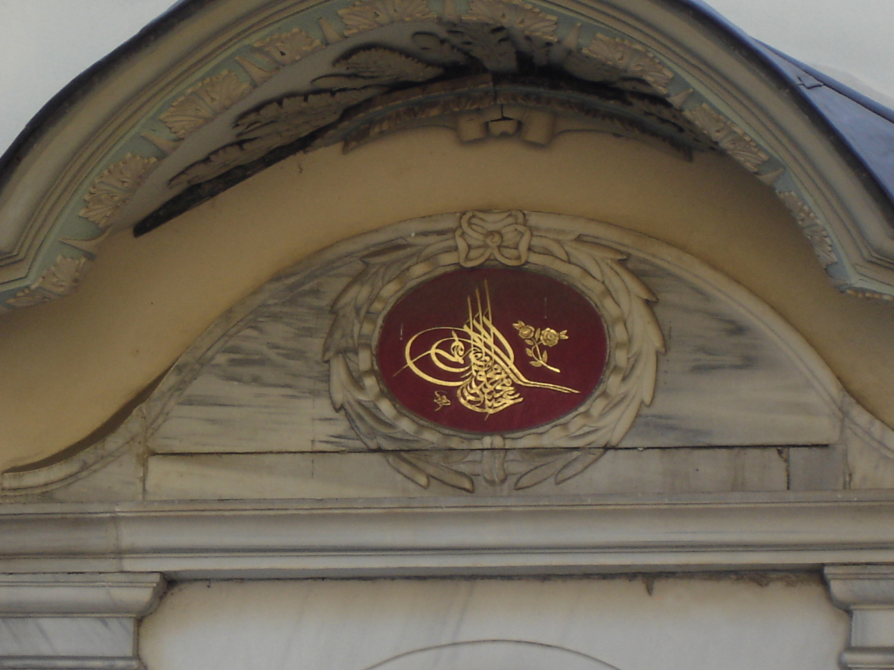 Il monogamma del sultano sulla Sublime porta (Bab-ı Ali) ad Istanbul. Era il portone che conduceva al quartier generale del gran visir, dove il sultano teneva la cerimonia di benvenuto per gli ambasciatori stranieri. Nel linguaggio diplomatico il suo nome era passato a indicare il governo ottomano stesso. Foto di: Giovanni Dall'Orto, 25-5-2006. Bab-ı Ali in Ottoman times. Bab-ı Ali today. The imperial monogram.